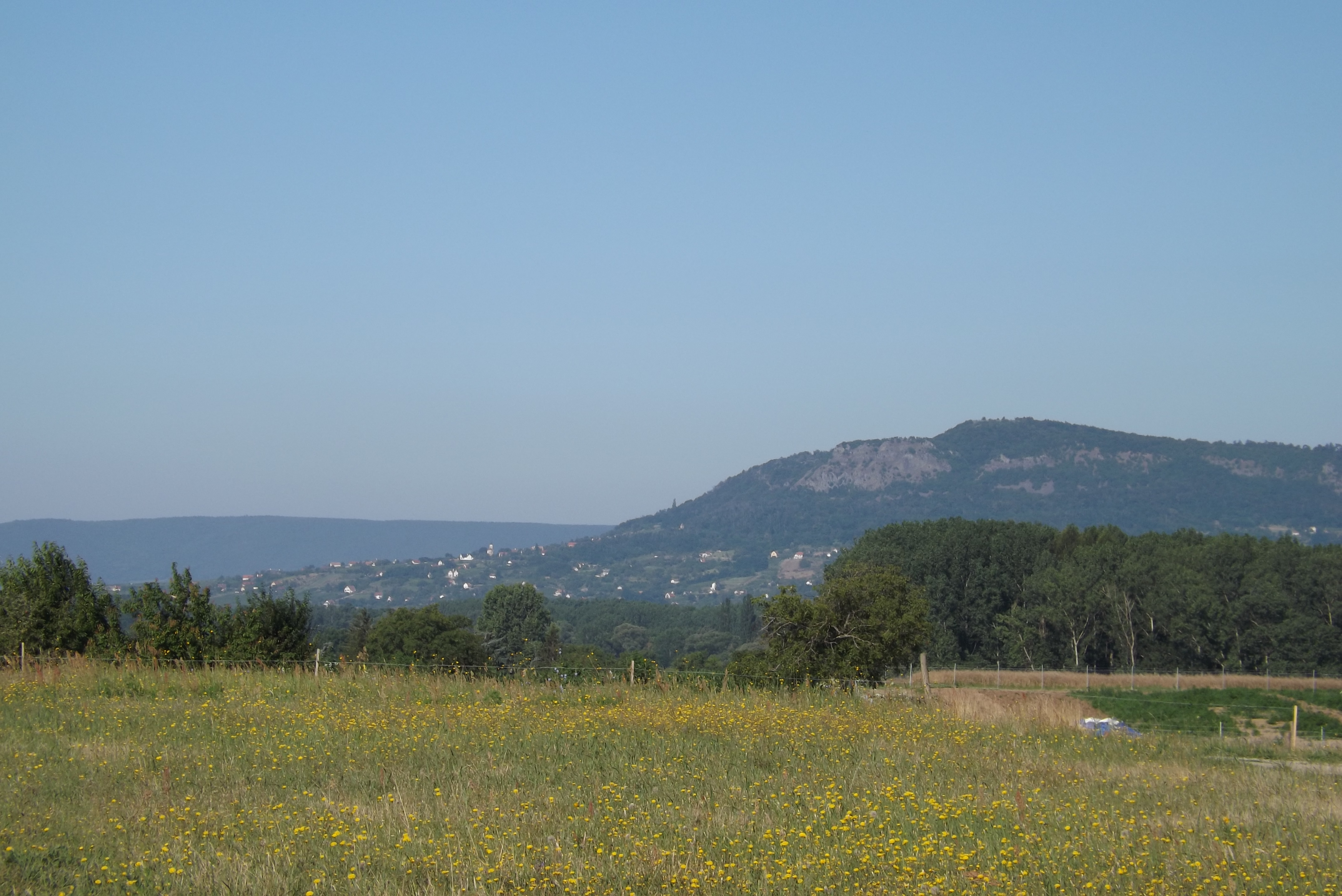 Káptalantóti, látkép a falu fölül